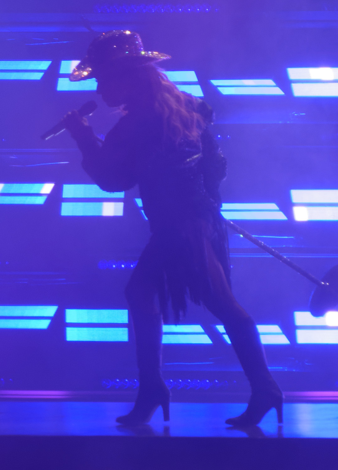 Lady Gaga performing "Diamond Heart" at Joanne World Tour in Tacoma